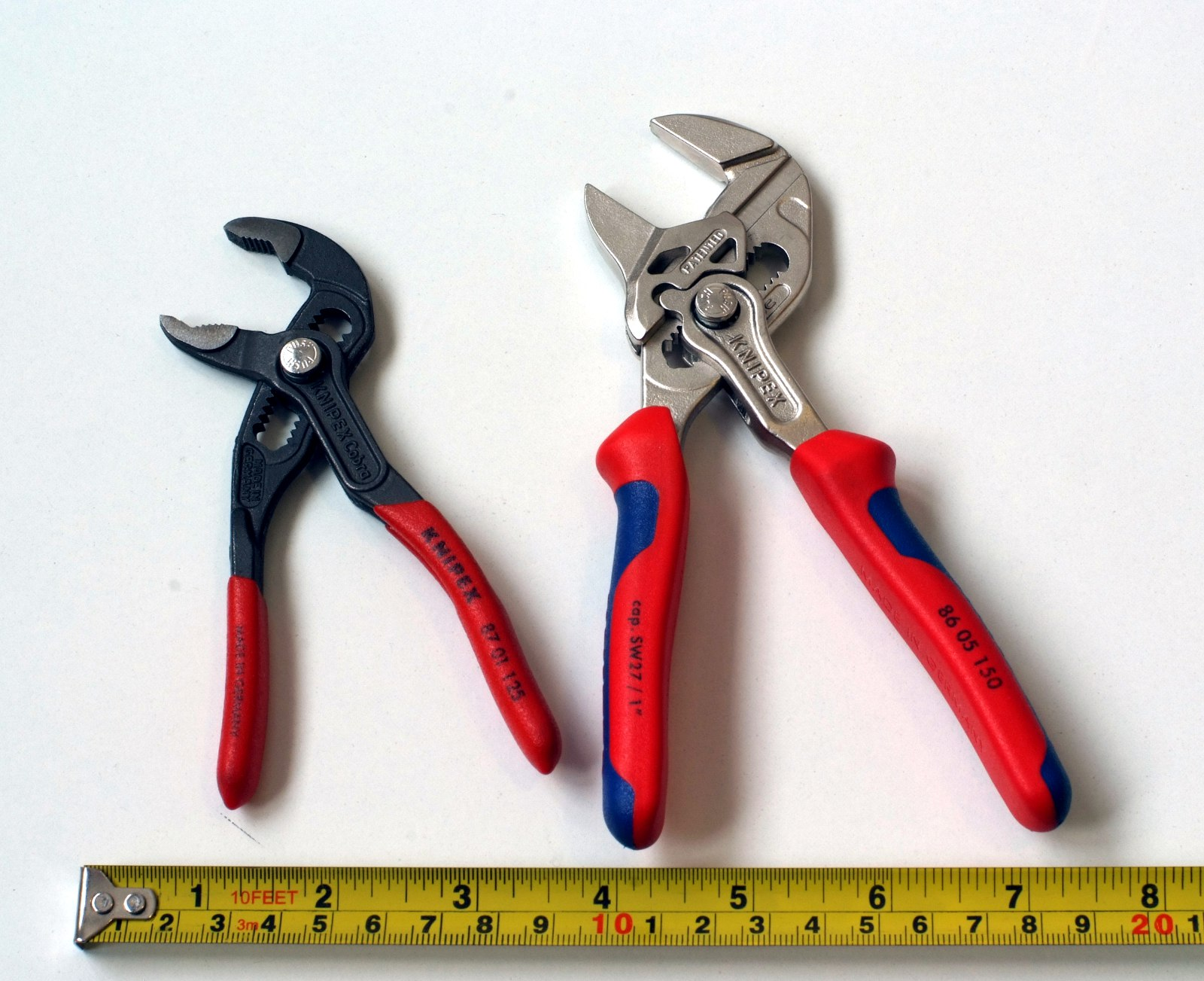 Mini-Wasserpumpenzange und Mini-Zangenschlüssel (Knipex)